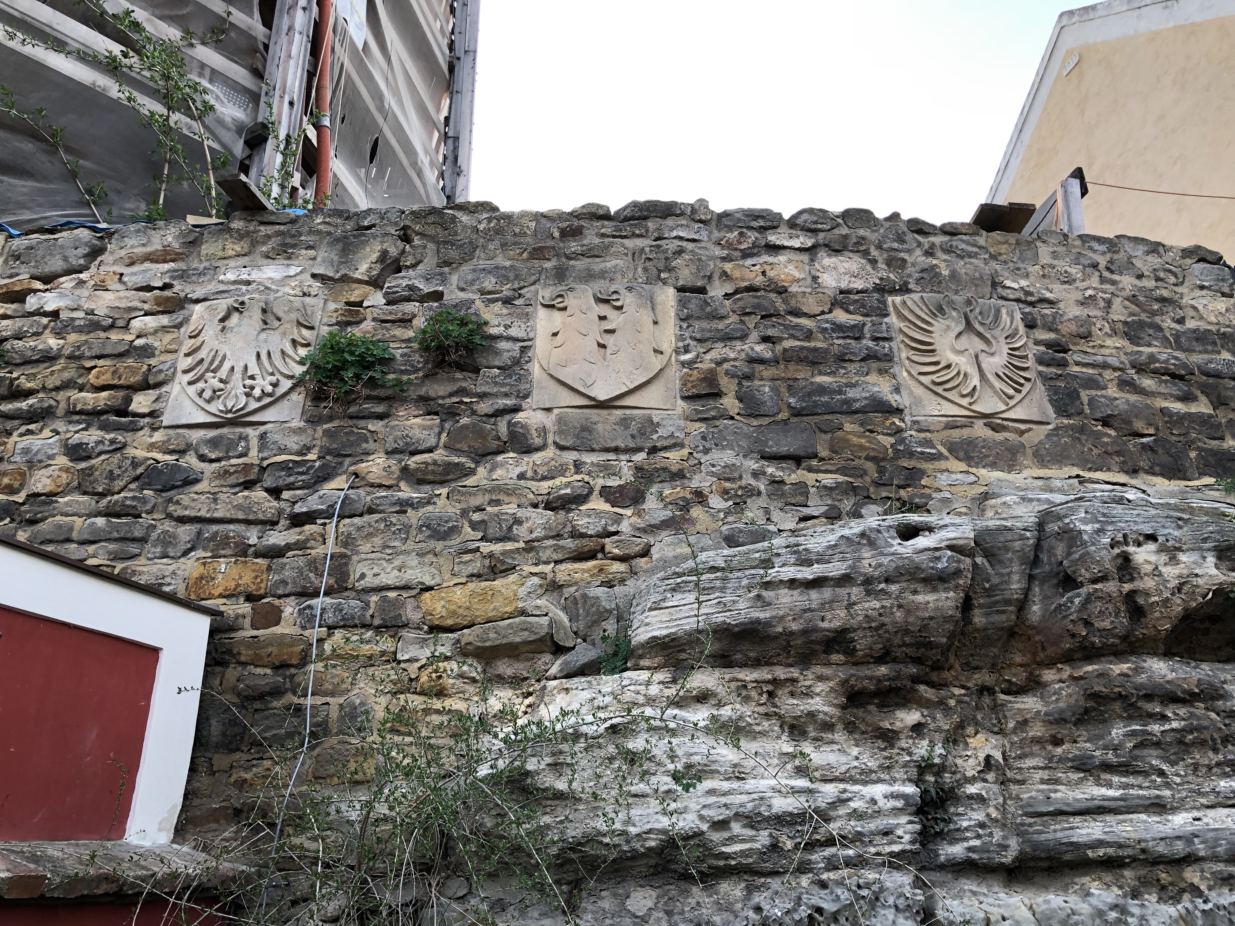 erby u vstupu